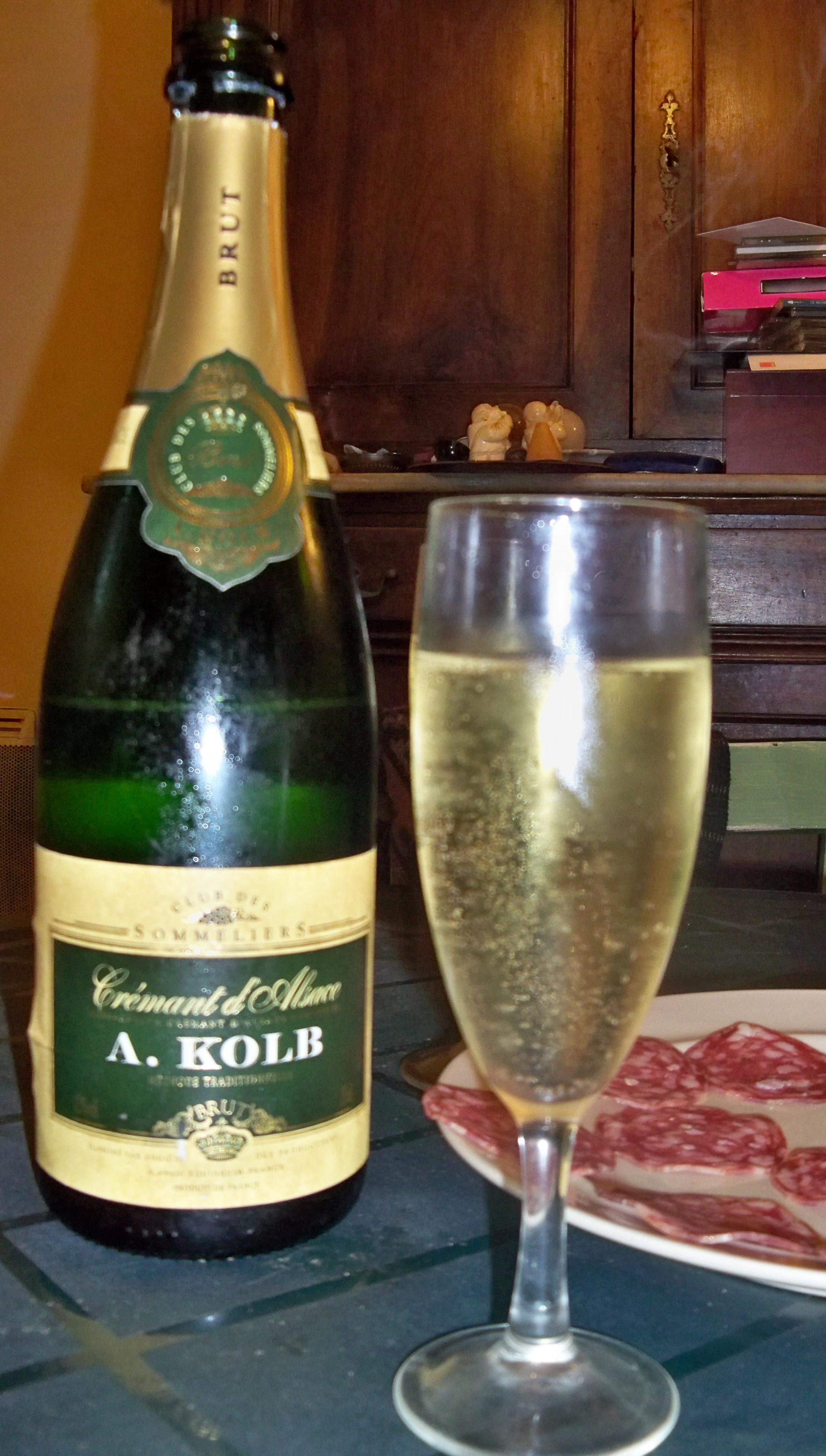 crément d'Alsace